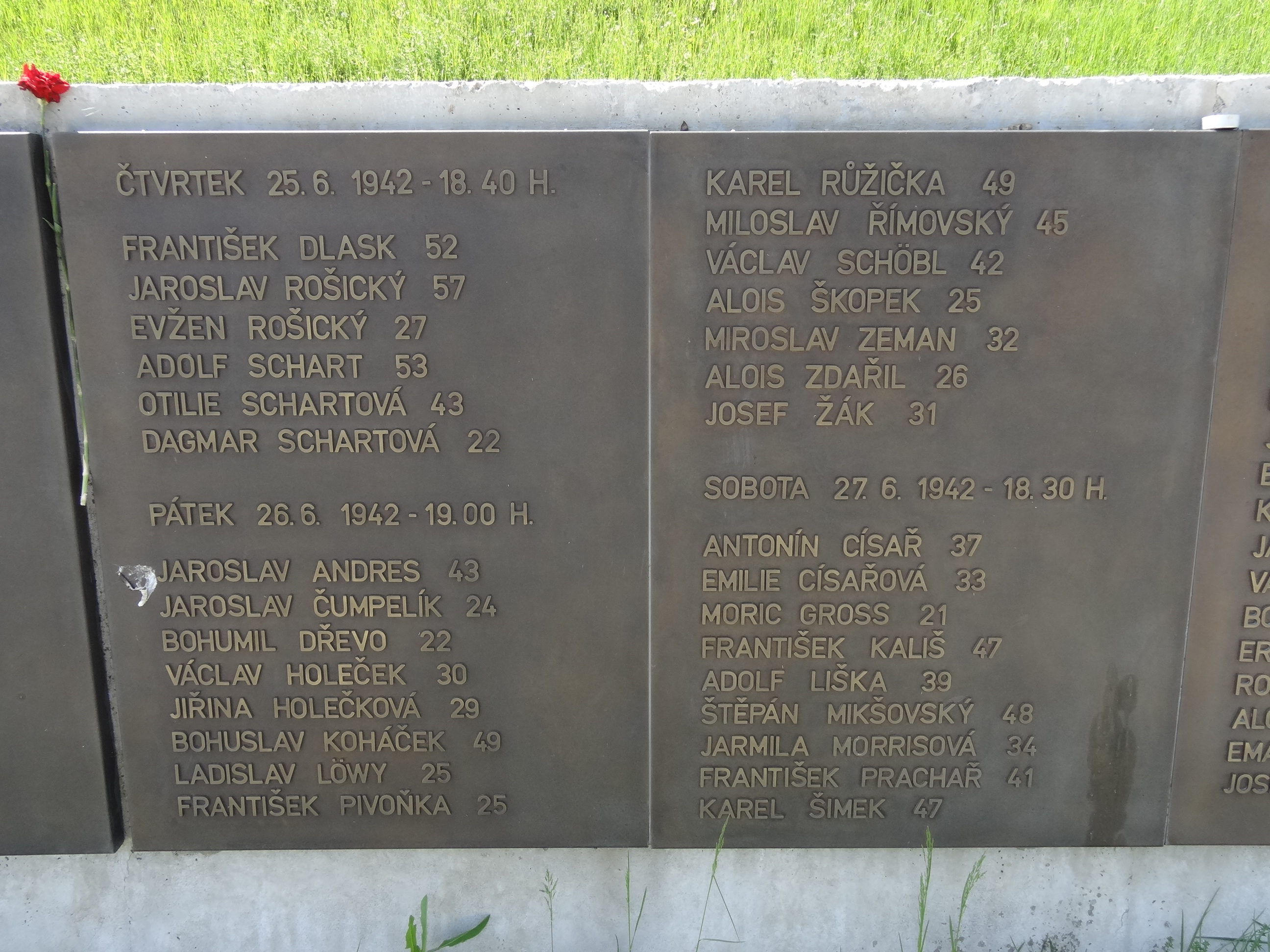 Kobyliská střelnice - pamětní desky se jmény popravených